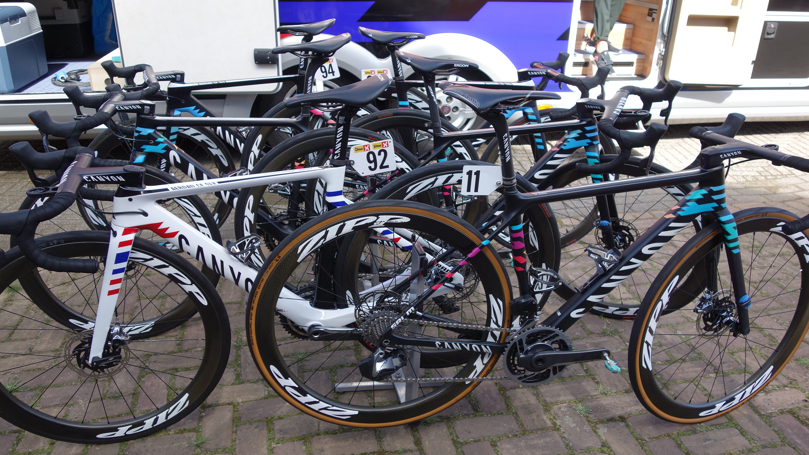 Fietsen van Canyon-SRAM bij de start van de eerste etappe van Stramproy naar Weert in de Boels Ladies Tour 2019